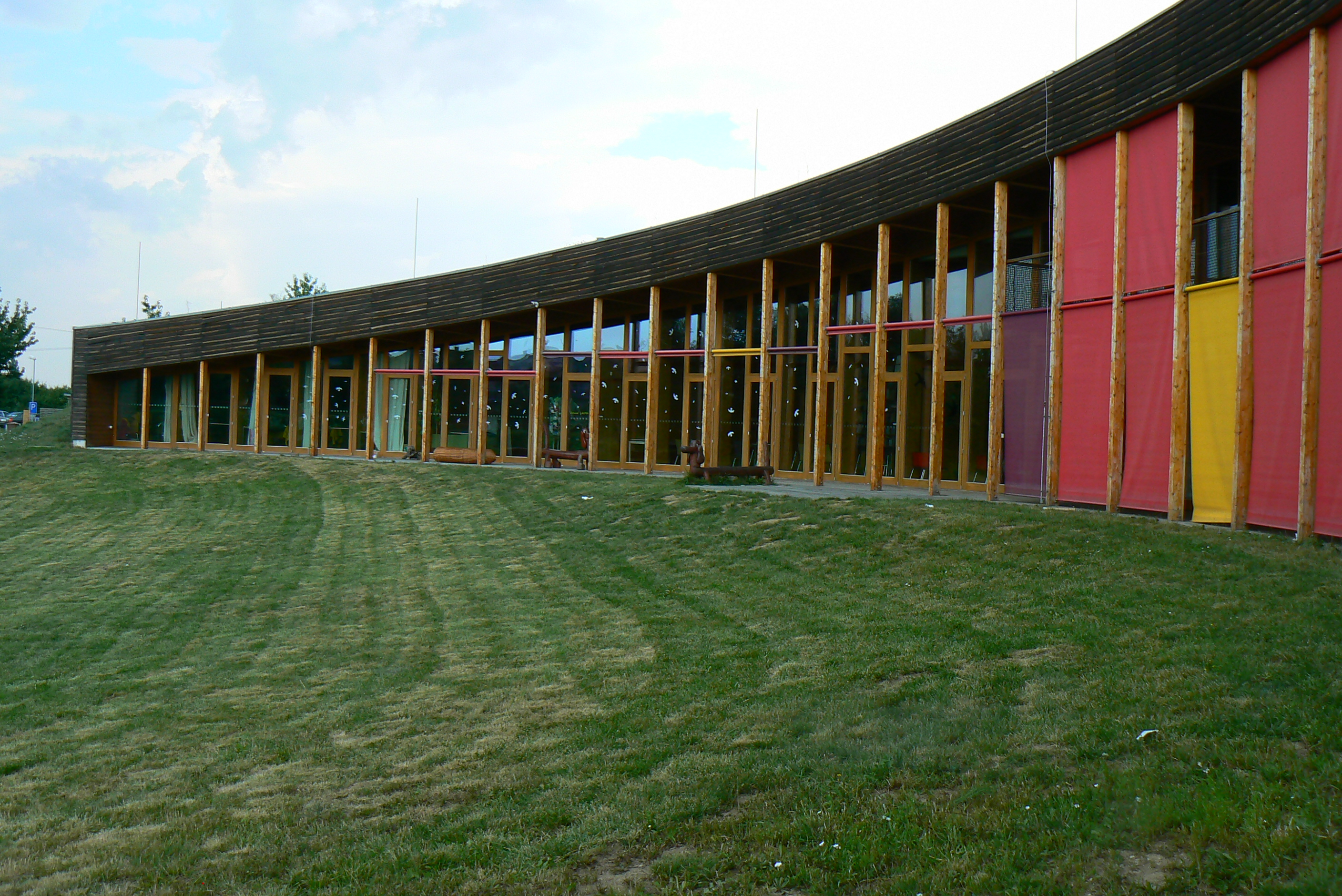 Slunákov